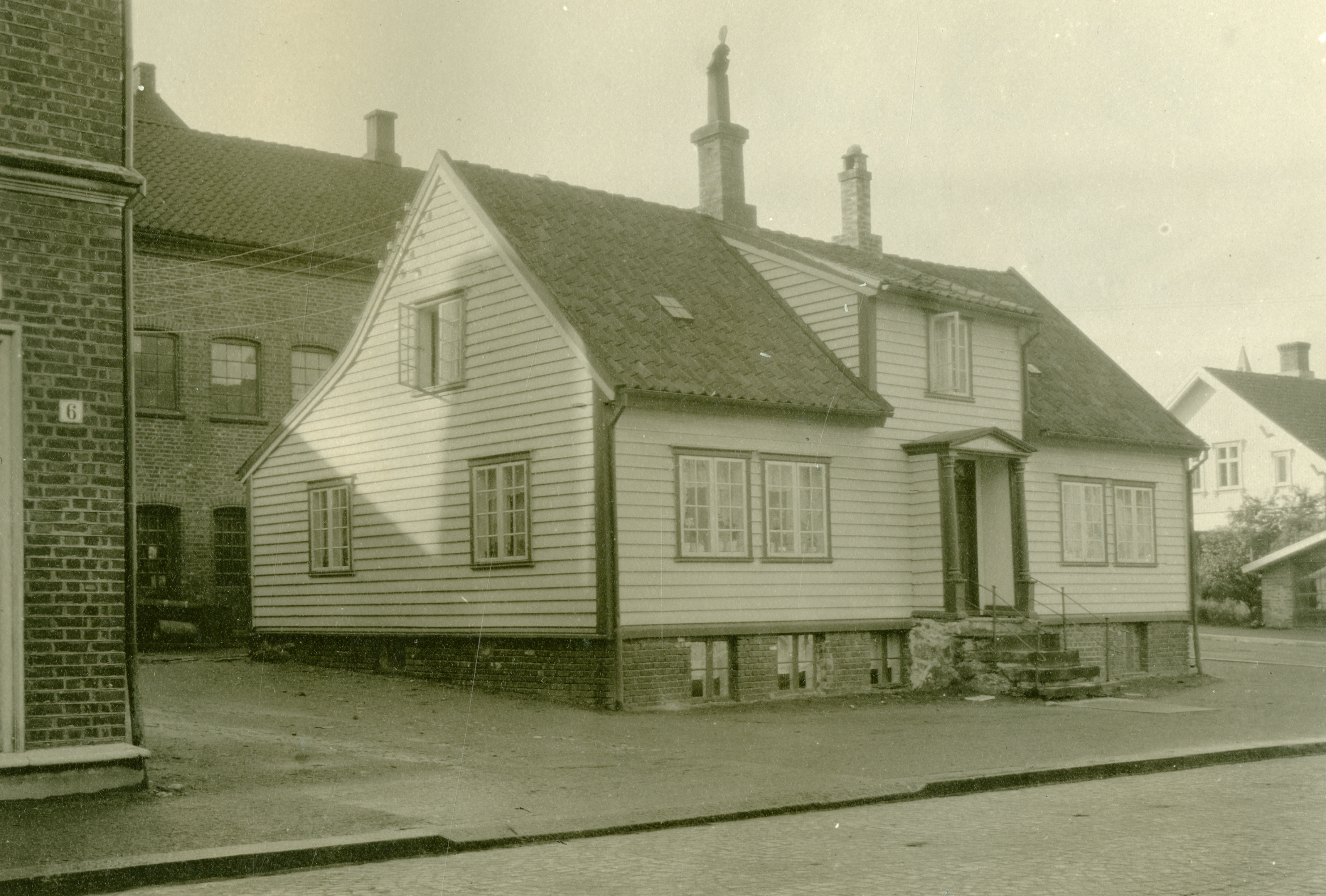 Nygårdshuset i Sandnes, Rogaland